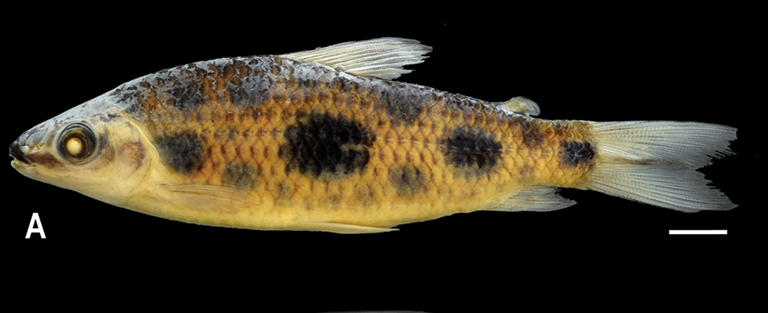 Leporinus gossei. Río Oyapock, Brasil.